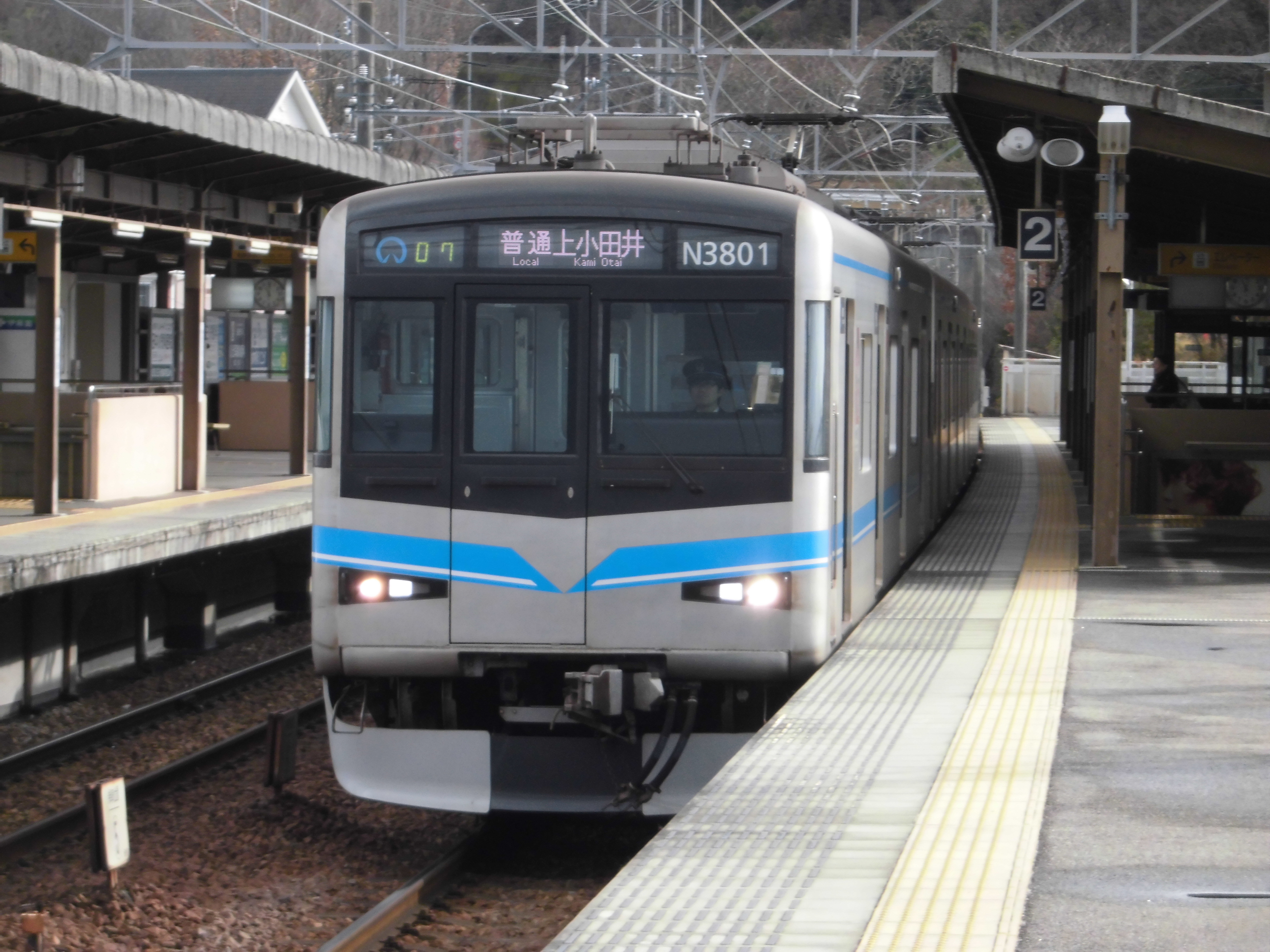 三好ヶ丘駅にて